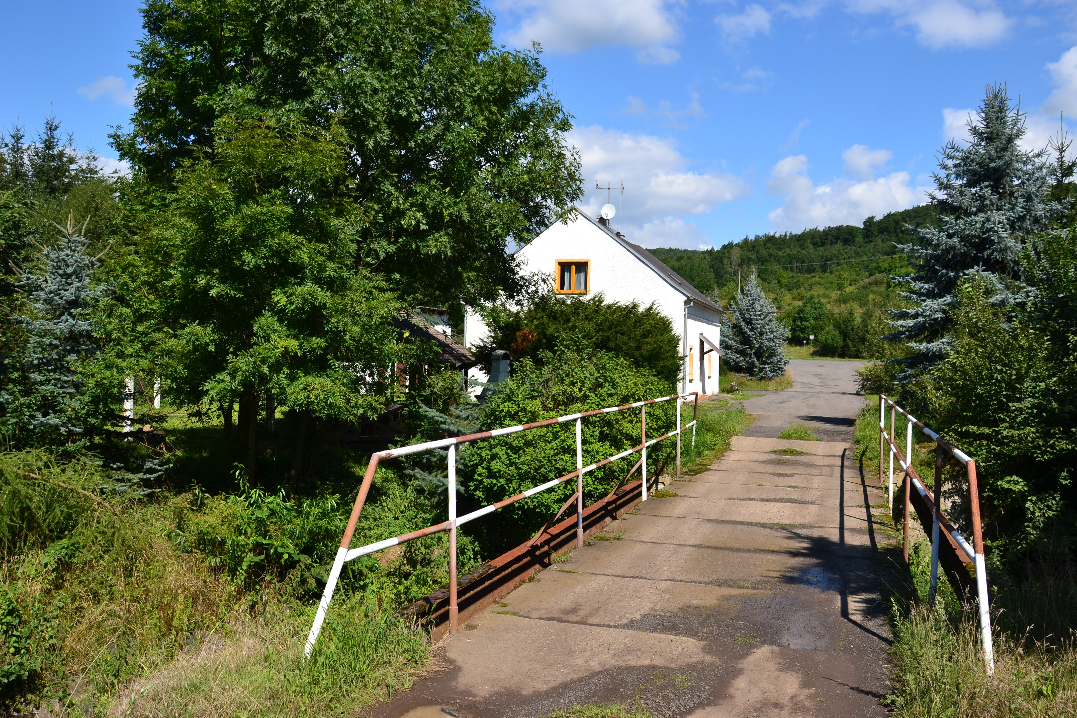 Most přes Liboc